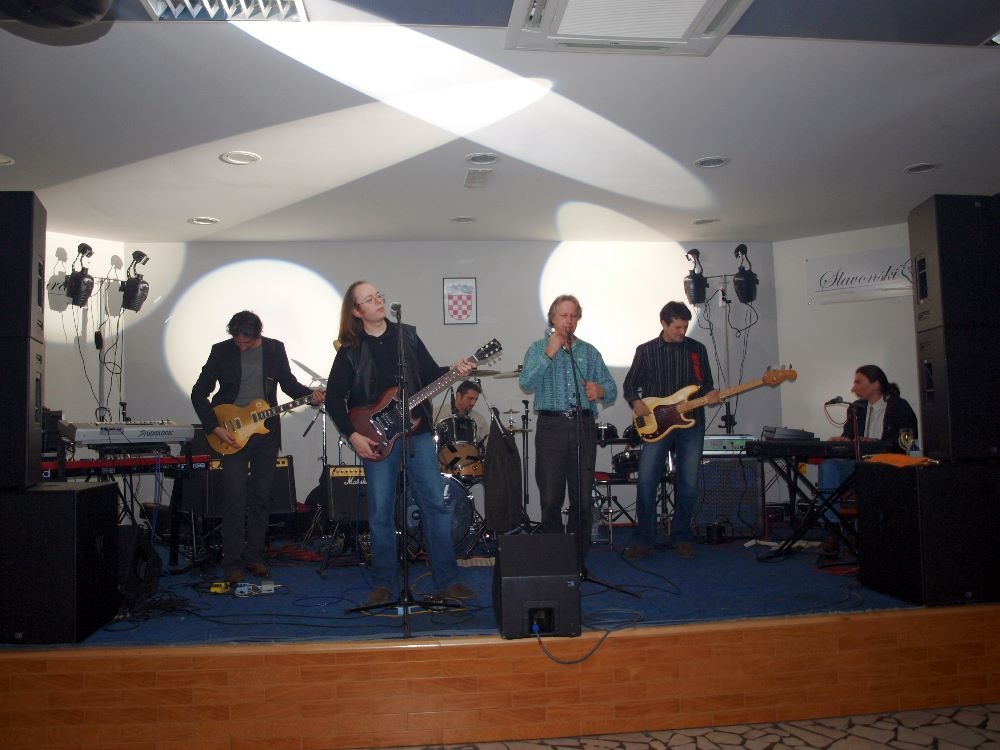 Sastav Drugi način u Slavonskom Brodu.